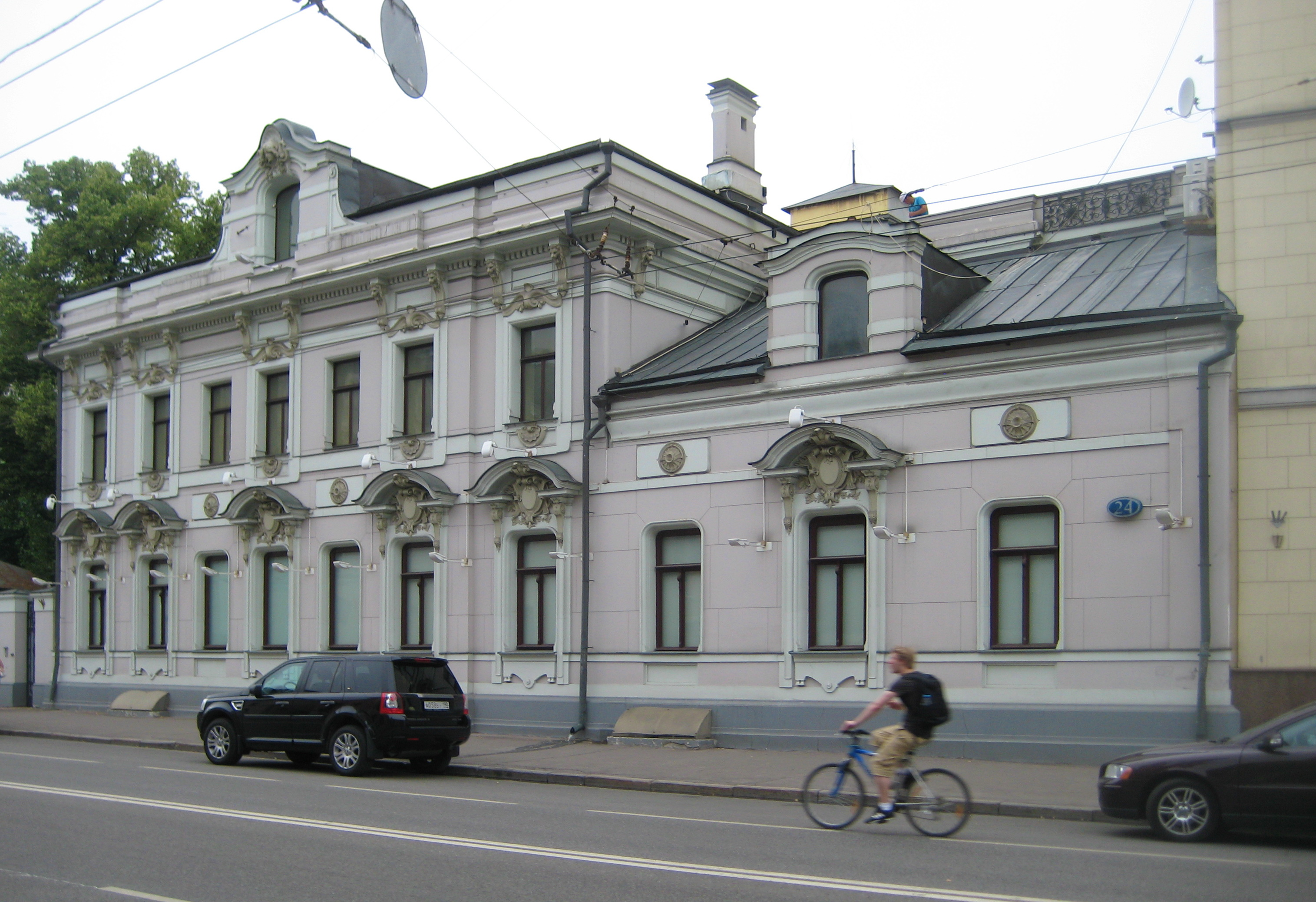 Остоженка